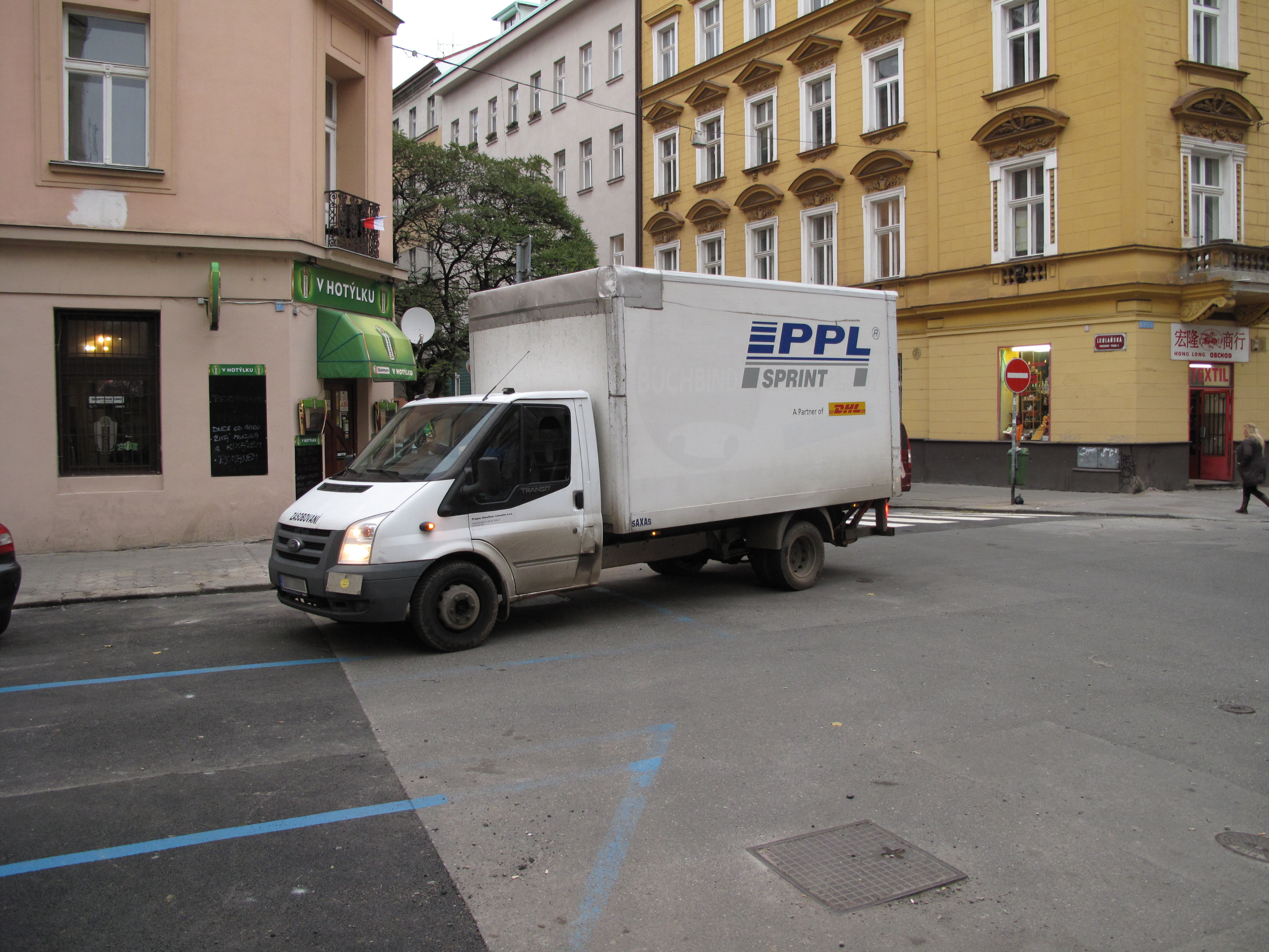 Rozvoz PPL v Praze na Vinohradech. Praha, Česká republika.